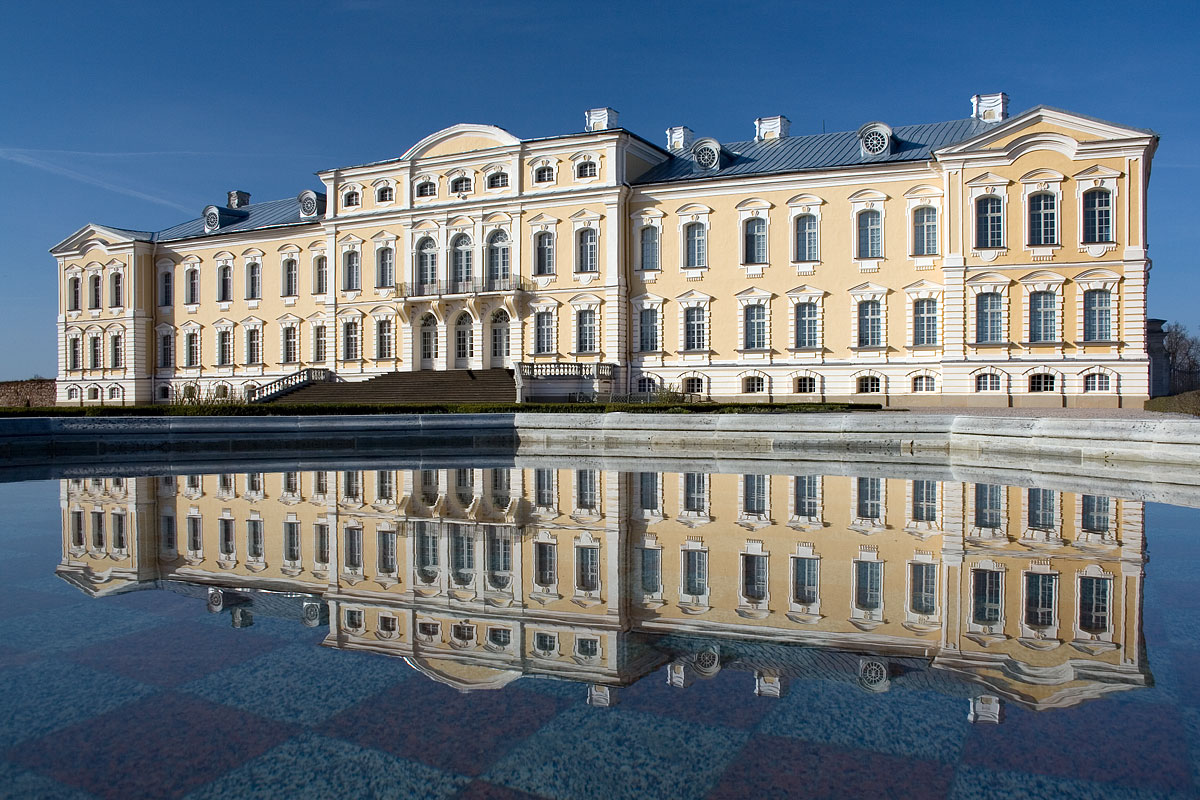 Rundale palace